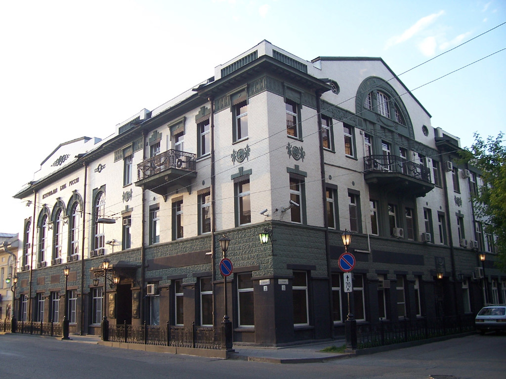 здание бывшего Азовско-Донского банка(1910 года), архитектор Фёдор Иванович Лидваль.